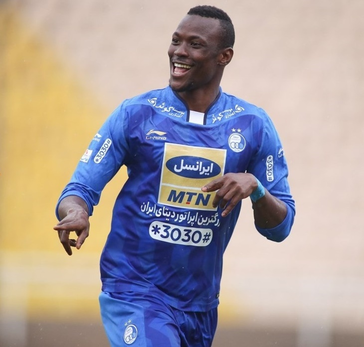 گزارش تصویری خبرگزاری فارس از بازی استقلال تهران و فولاد خوزستان در ۵ اسفند ۱۳۹۶